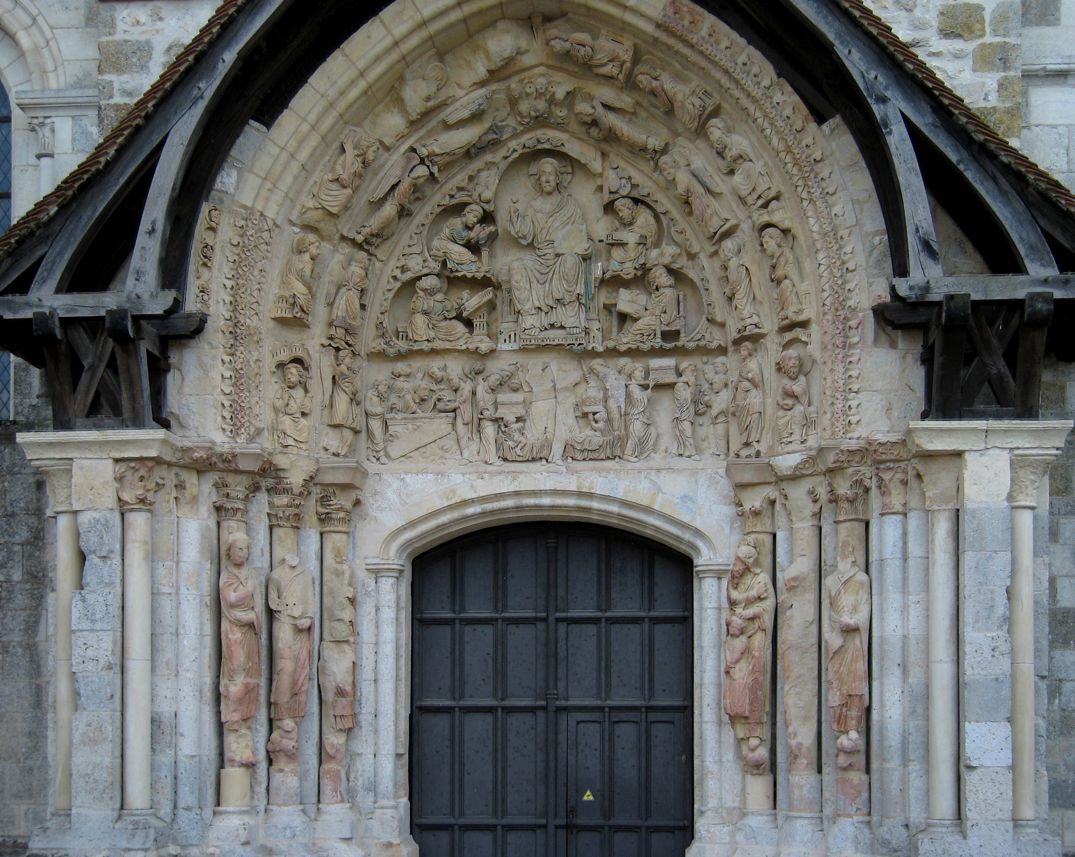 Abbaye de Saint Benoît, located in the town of Benoit-sur-Loire in the département of Loiret/France